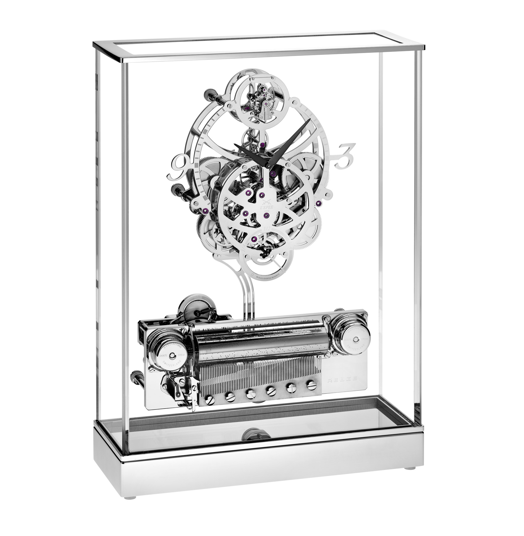 Pendulette musicale avec 40 jours de réserve de marche